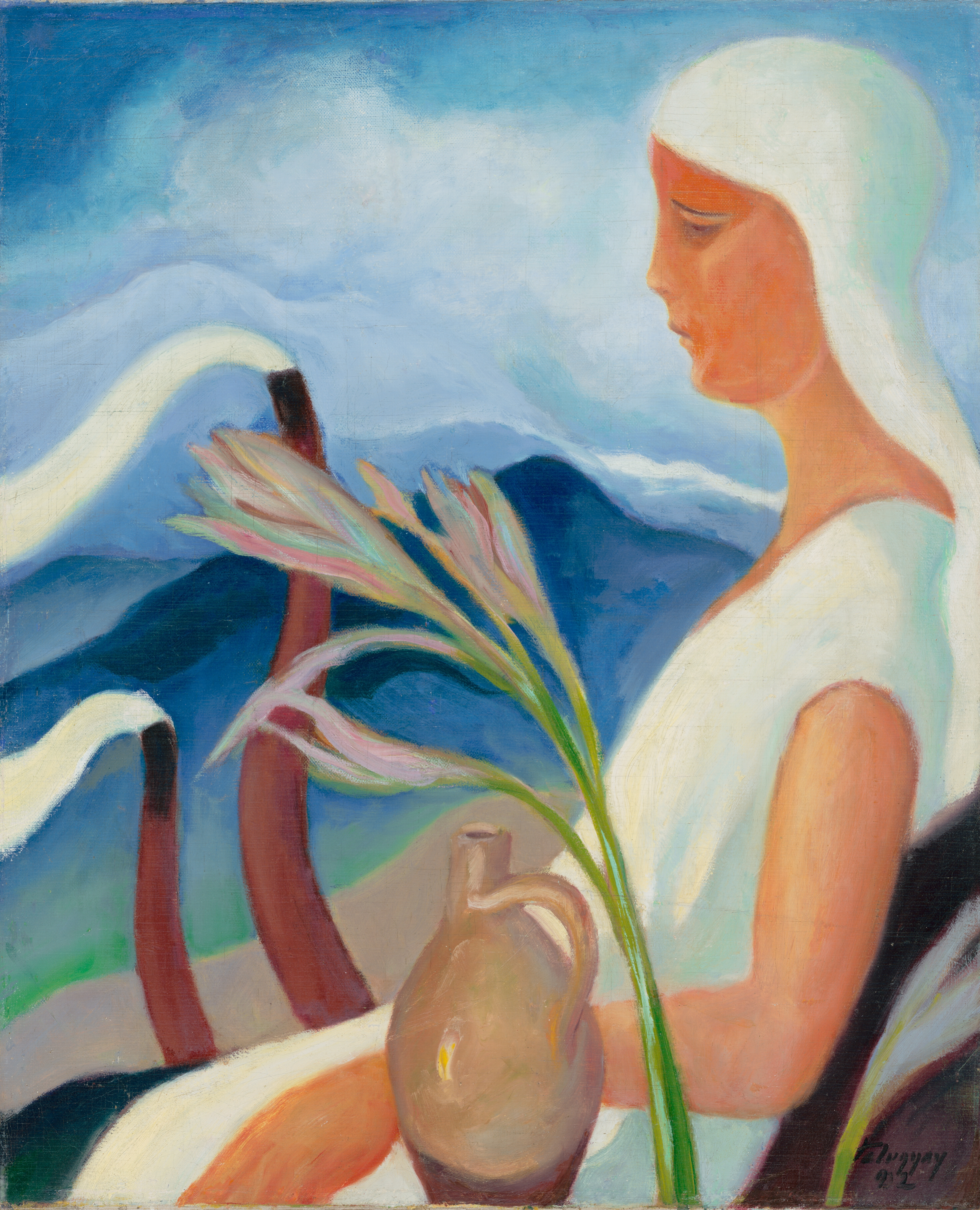 Palugyay-Dievča v bielom s továrenskými komínmi a s kvetmi